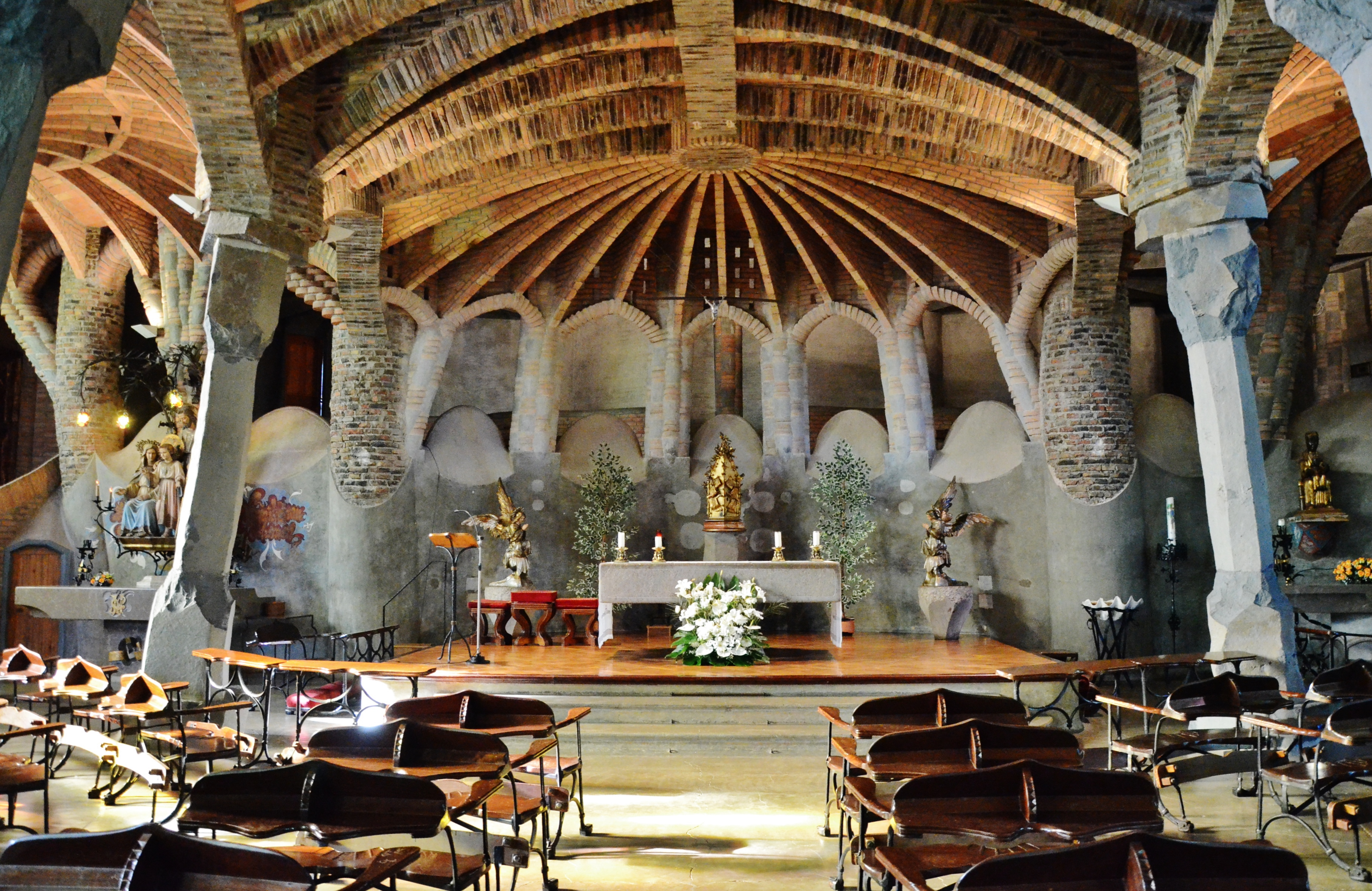 Cripta de la Colònia Güell (Santa Coloma de Cervelló)